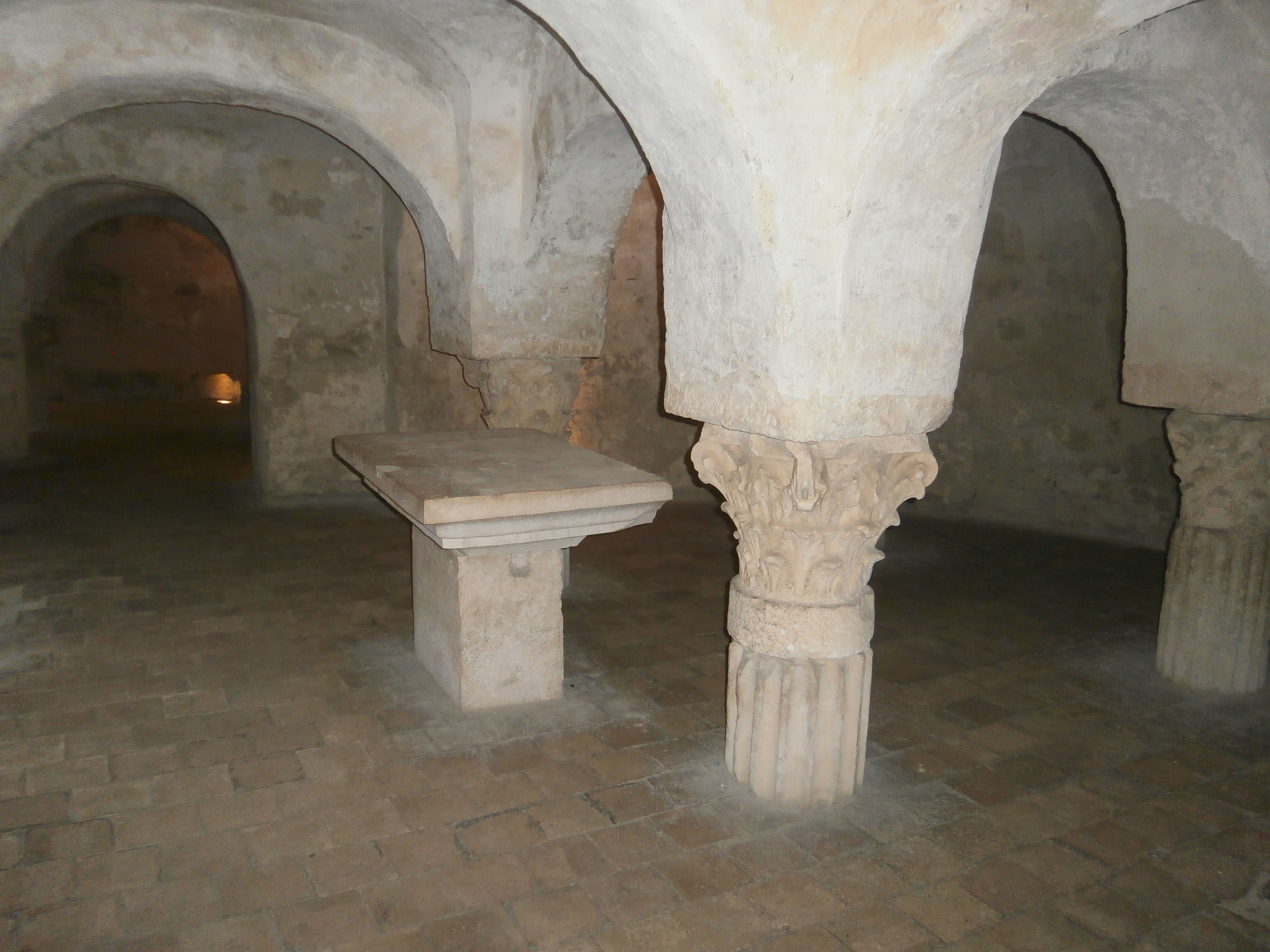 Abbazia di San Clemente a Casauria - cripta